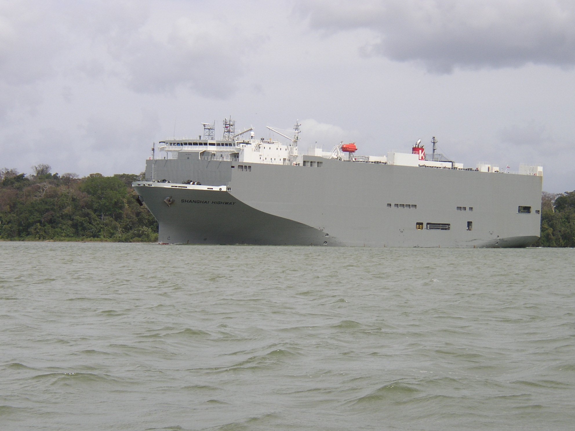 Autotransporter Shanghai Highway auf dem Gatunsee Panamakanal IMO Number: 9294343 MMSI Number: 371318000 Callsign: 3ECE2 Length: 179 m Beam: 31 m